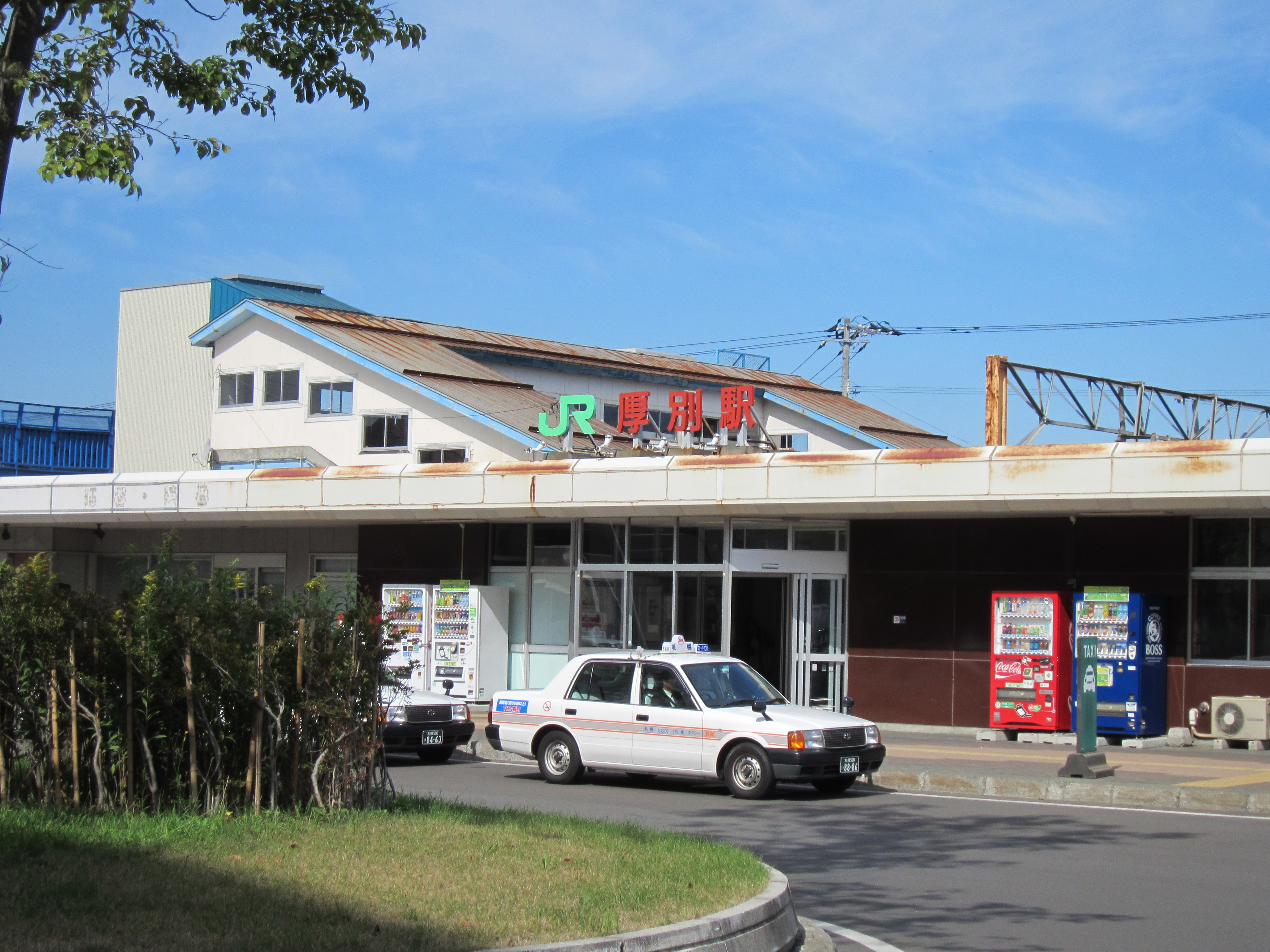 JR北海道の厚別駅